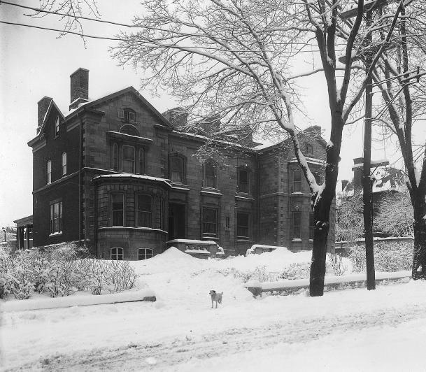 Photographie - Résidence de George Caverhill, rue Simpson, Montréal, QC, 1915